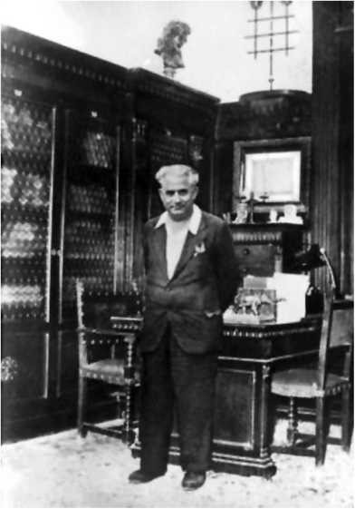 Luigi Corvaglia nella sua biblioteca personale